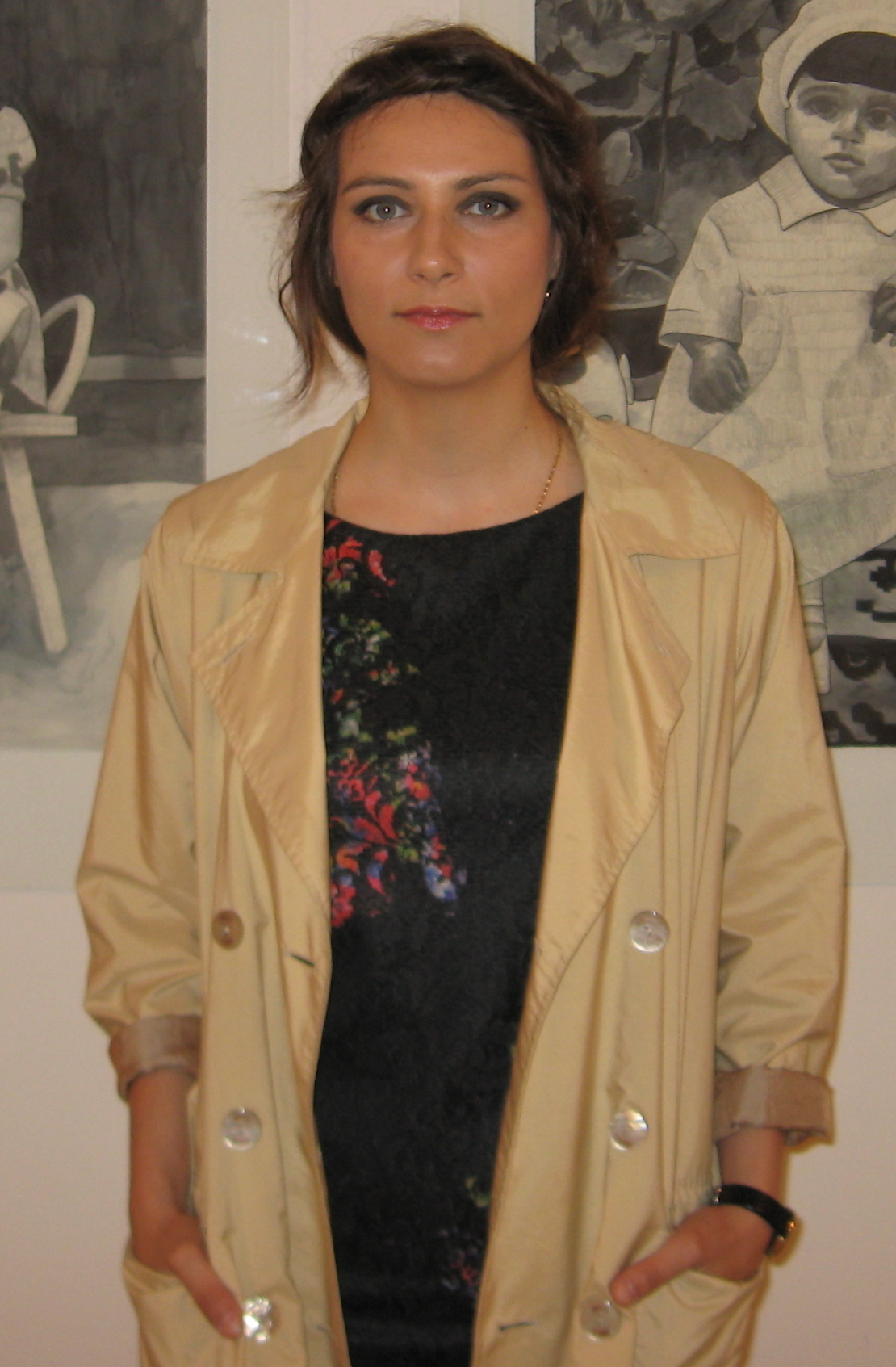 Anđela_Mujčić, Niš, maj 2013.